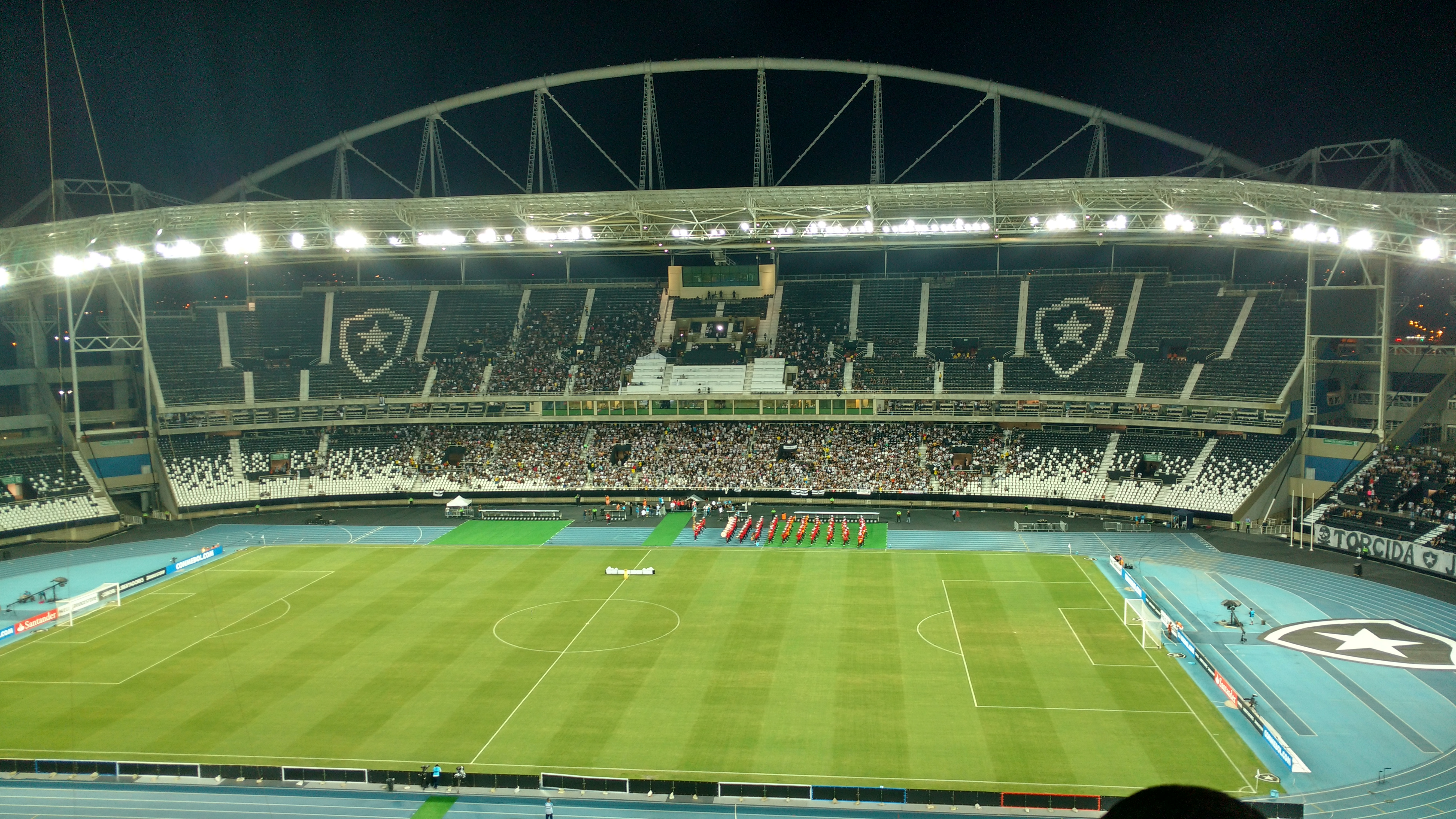 Estádio Nilton Santos no pré-jogo da partida Botafogo x Colo Colo válida pela Copa Libertadores de 2017